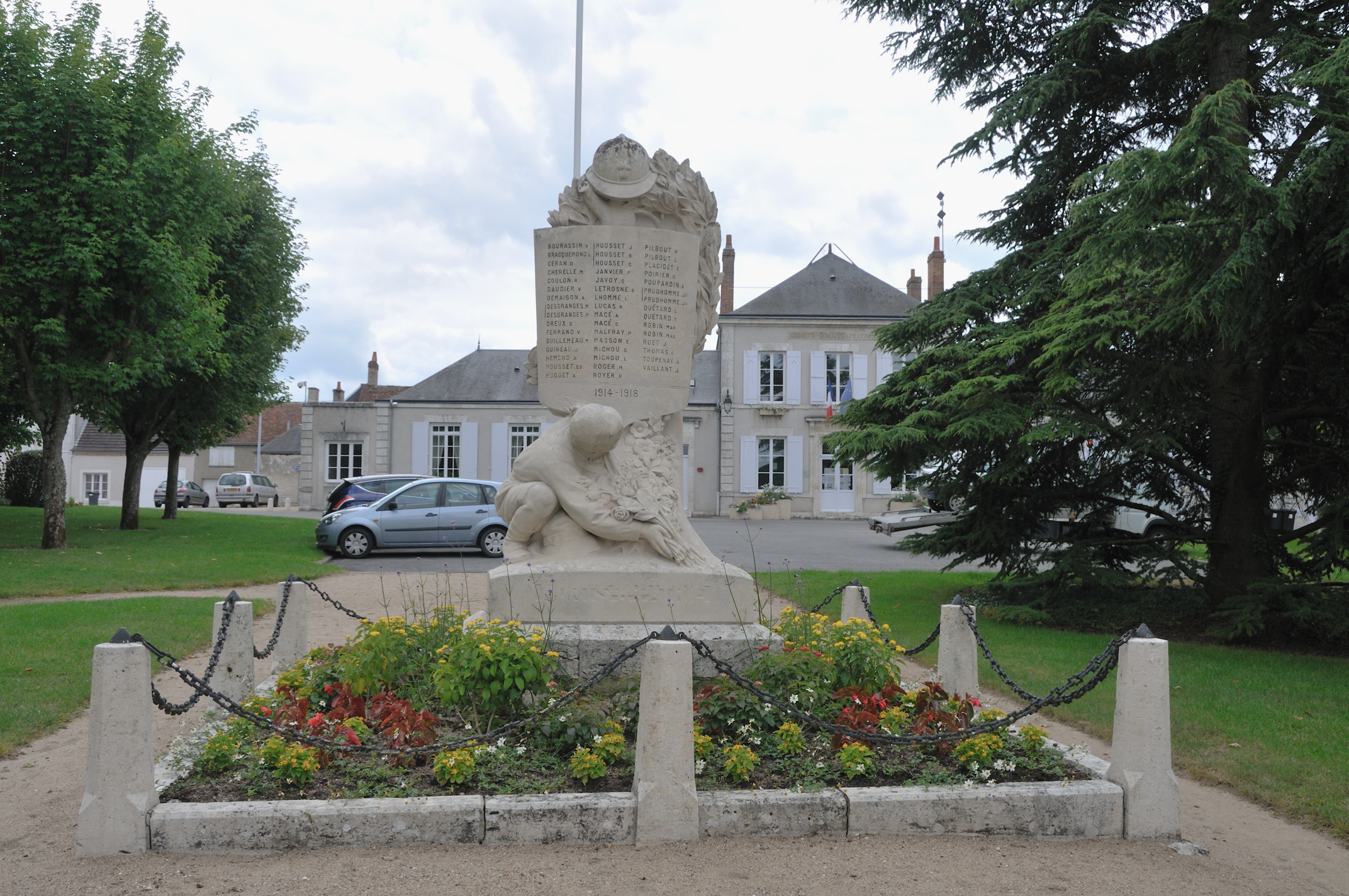 Monument aux morts, Saint-Ay, Loiret, France